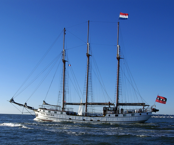 La goelette à trois-mâts Loth Loriën